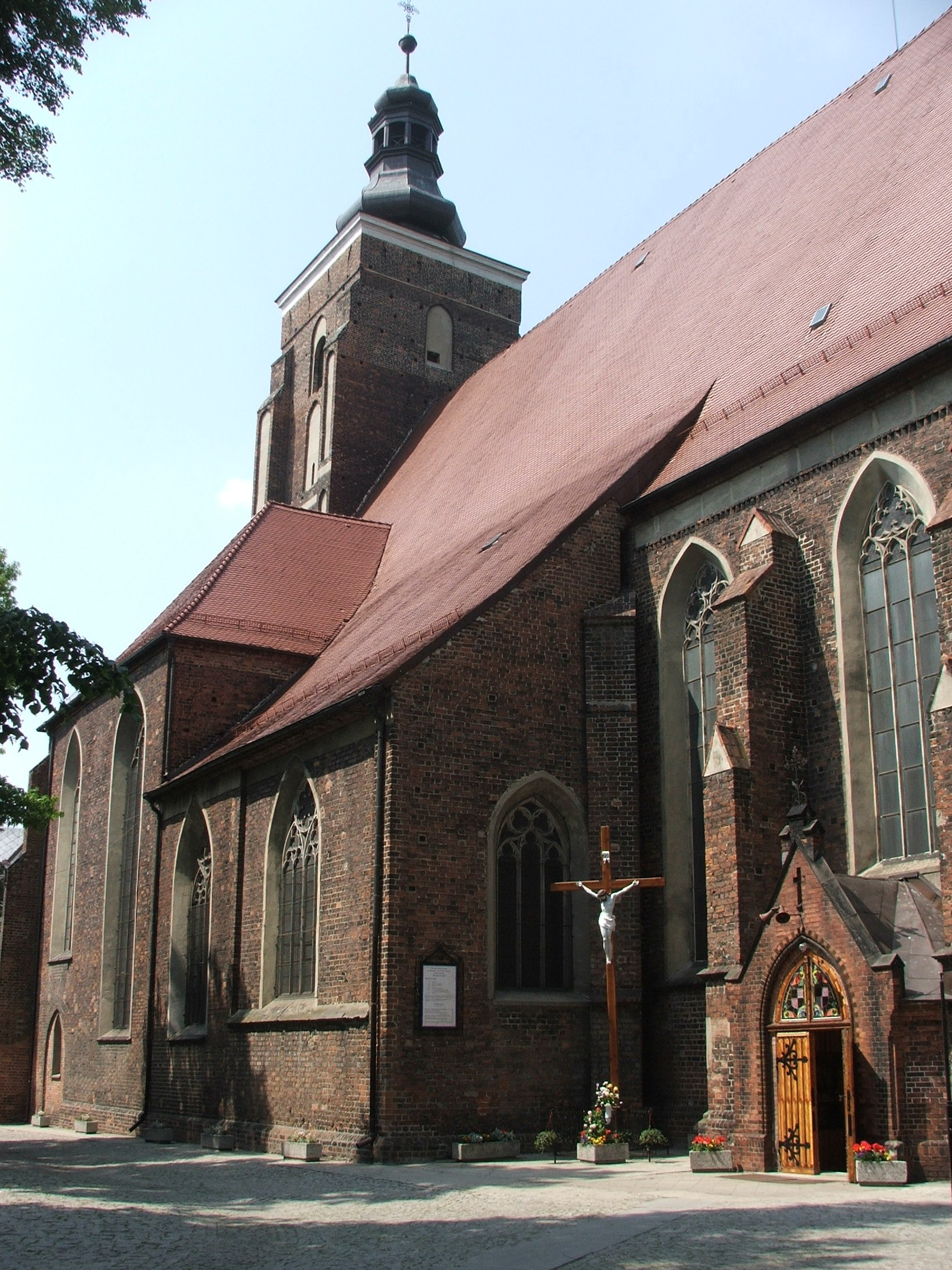 Namysłów - kościół parafialny pw. św. Piotra i Pawła 03.1949; 603/59 z 22.10.1959 (WKZ Opole). 267/58 z 28.01.1958